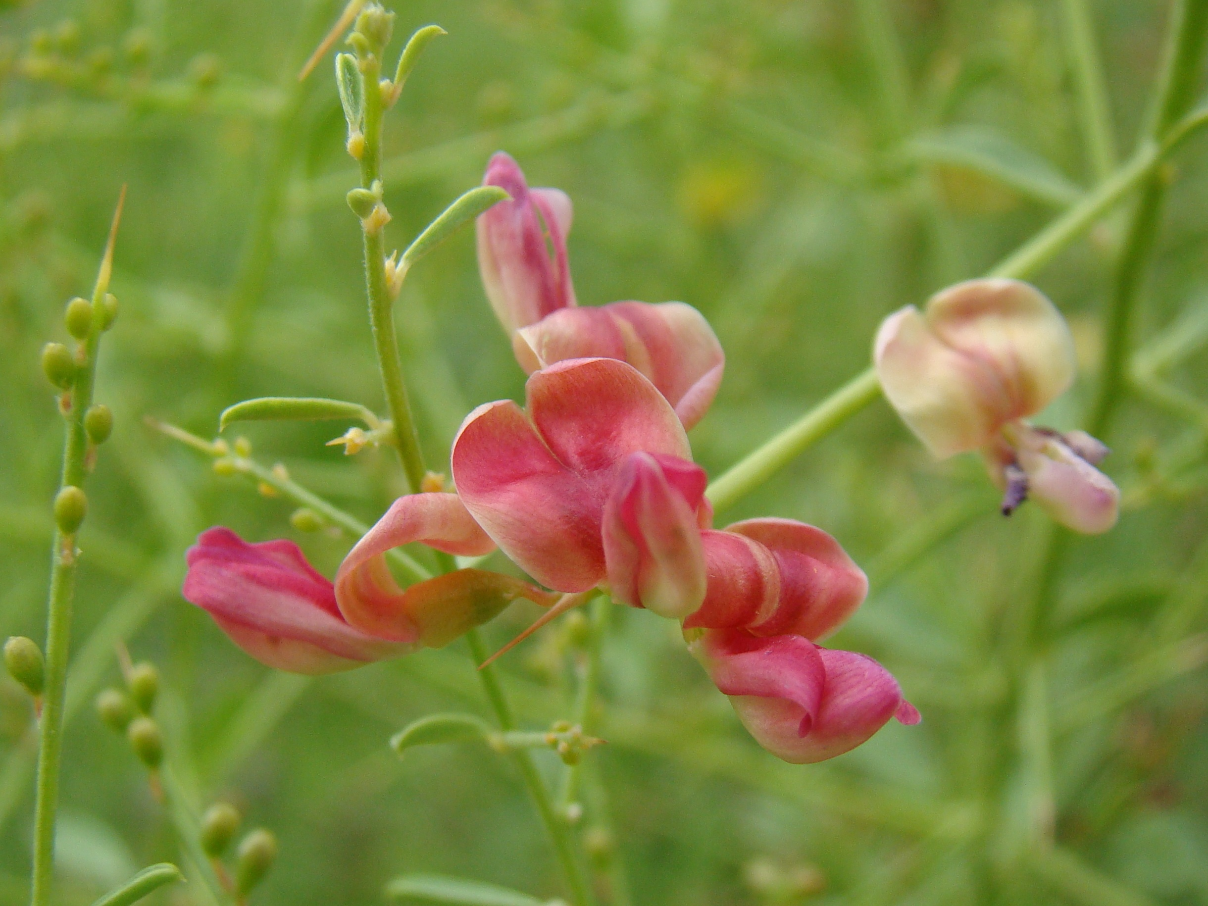 Верблюжья колючка (Alhagi sp.). Окрестости города Байконур, Казахстан